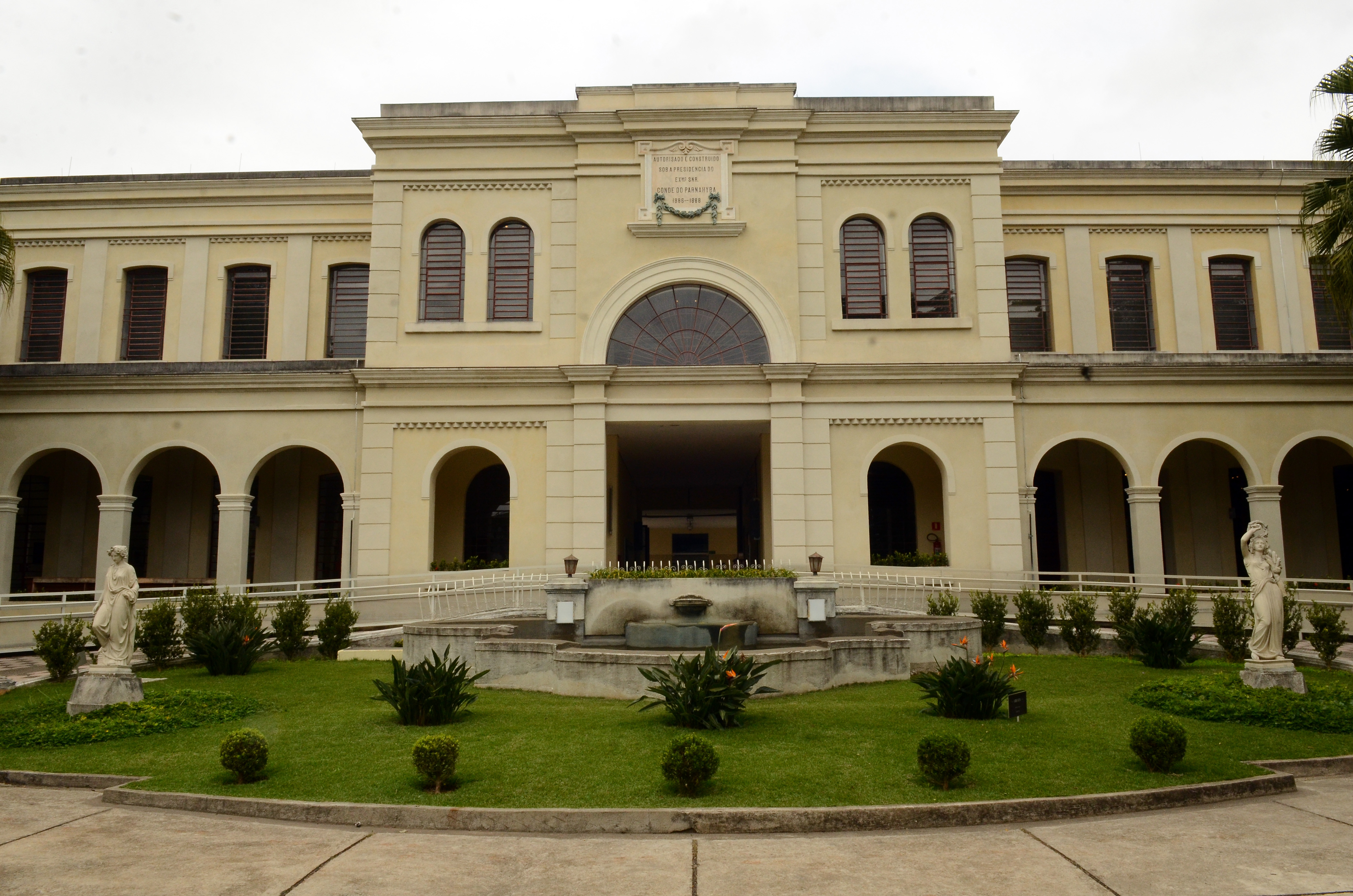 São Paulo - Fachada do Museu da Imigração, na Mooca, zona leste (Rovena Rosa/Agência Brasil)